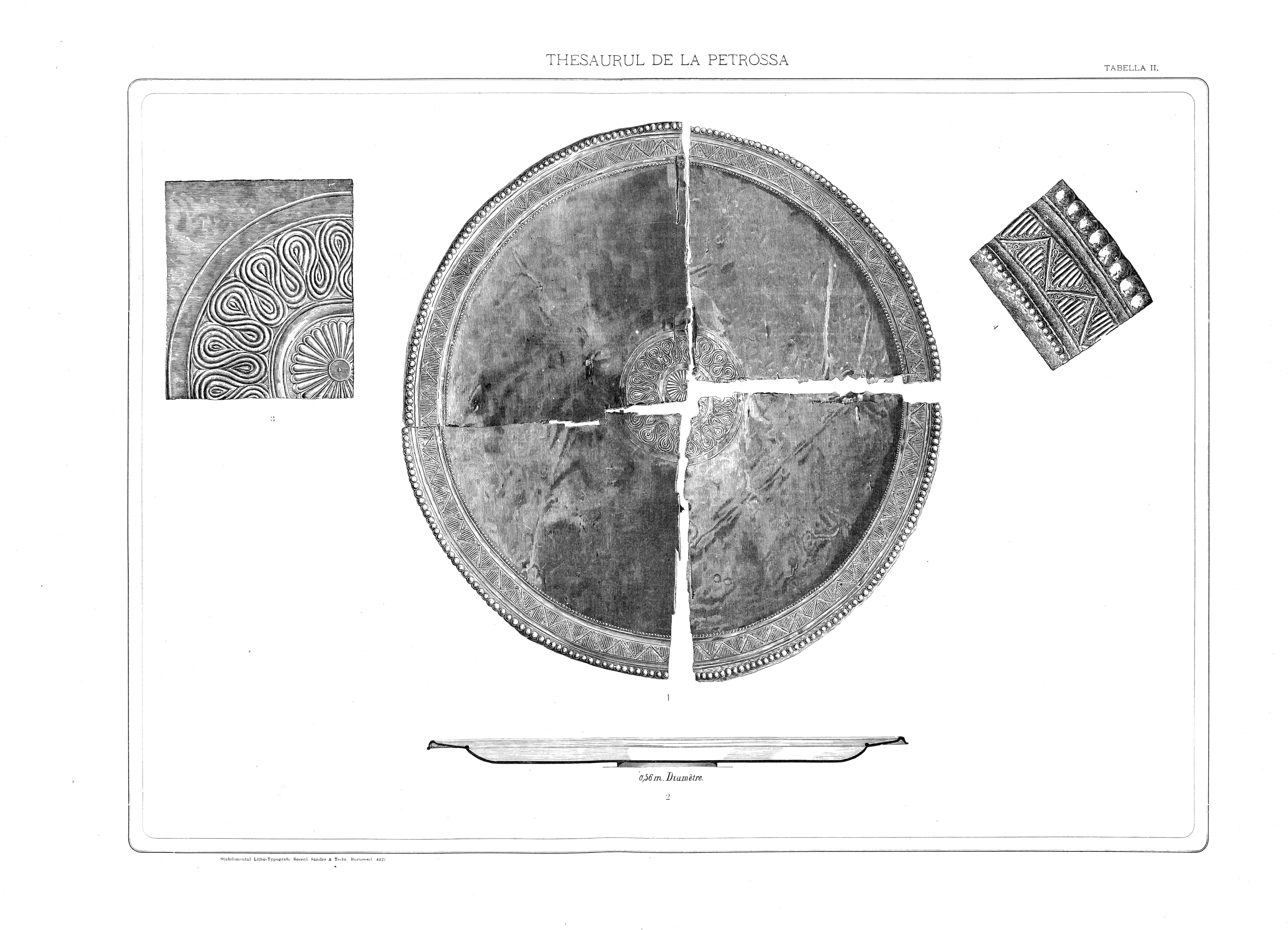 Tava cea mare sau Discul, cu desenuri în stil grecesc. Tava a fost tăiată în patru bucăți cu săcurea. Ea are 53 de centimetri în diarnetru, cântărește 7 kil. 154 iar grosimea ei este de 2 milimetri. Valoarea aurului curat din care este făcută este de 24.400 lei (în anul 1875).